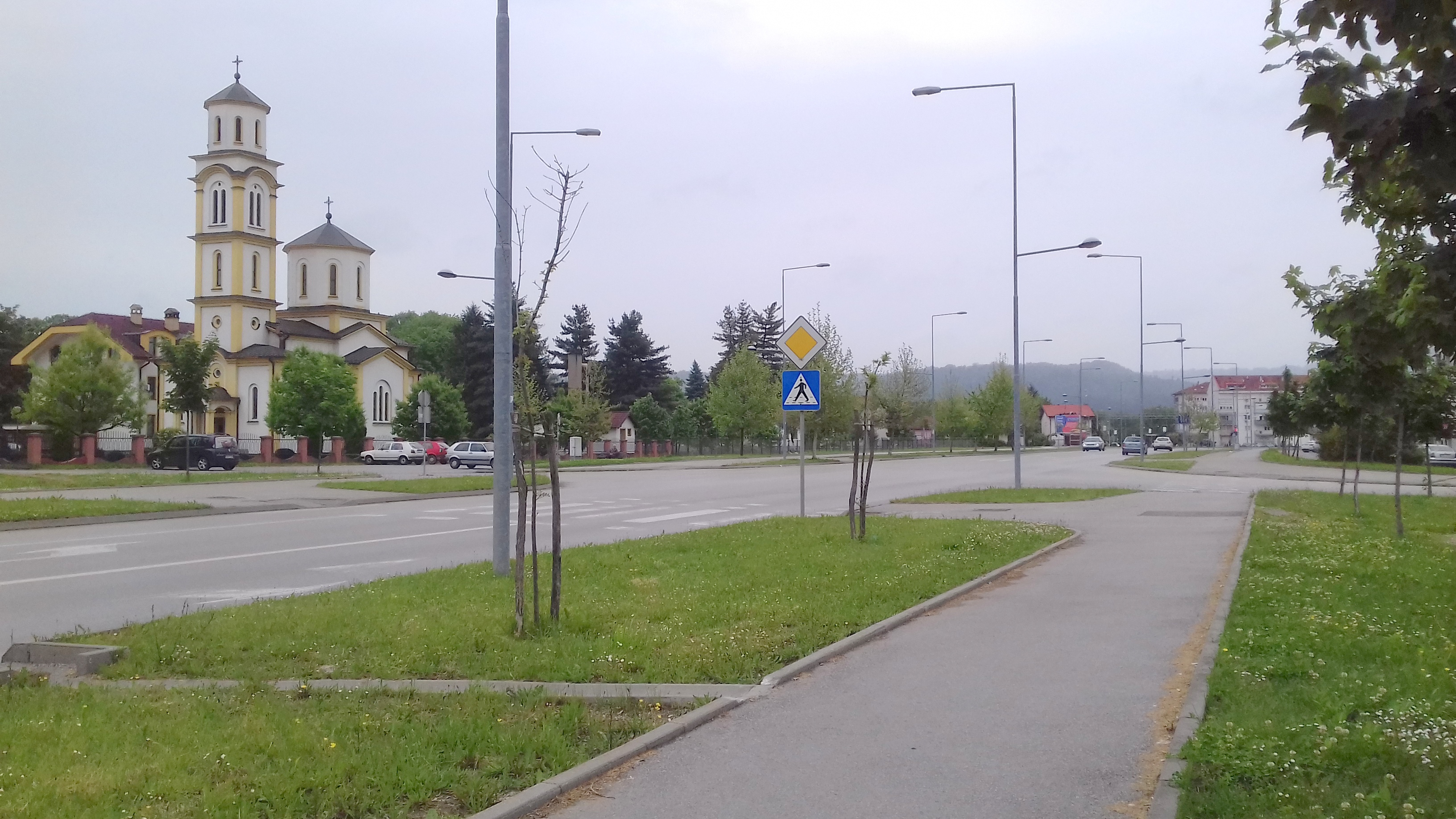 Бањалучко насеље, Лазарево